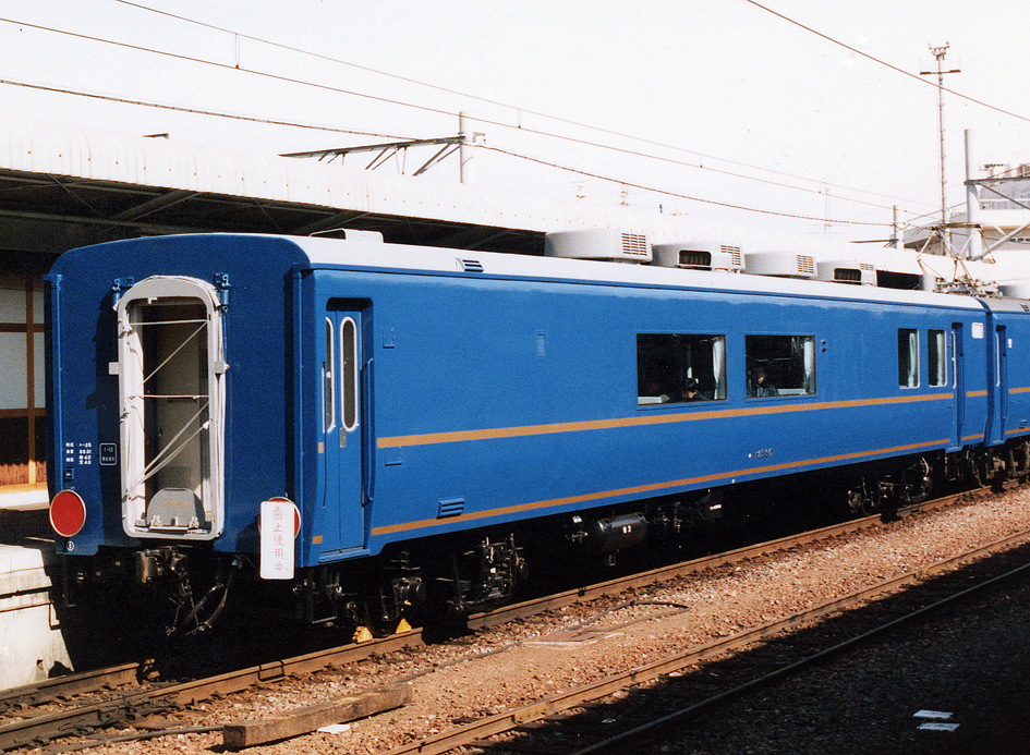 JR西日本 オハ25 301